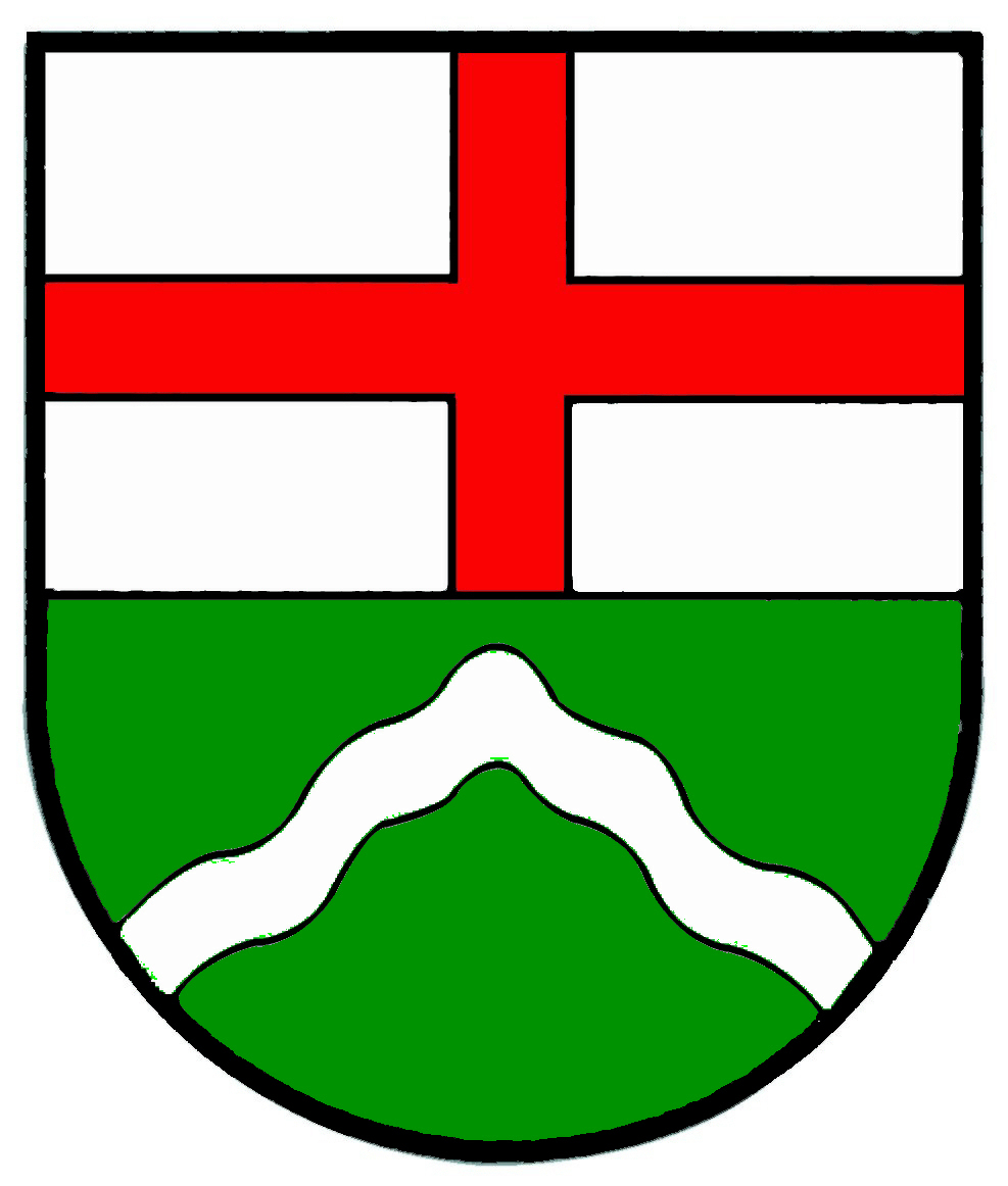 Wappen der Ortsgemeinde Palzem